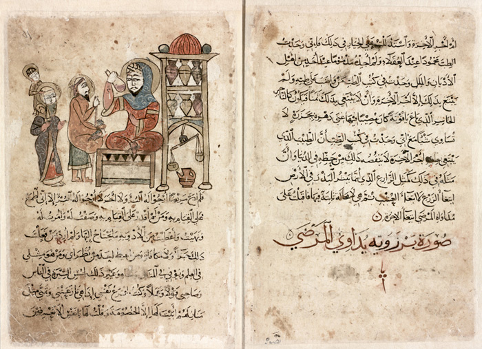 مخطوطة لكتاب «كليلة ودمنة»، تضم نصاً وصورة بعنوان «صورة برزويه يداوي المرضى». المخطوطة تعود إلى سنة 747 هـ، وتكمن أهمية المخطوطة كونها أقدم نسخة معروفة مزينة بالرسوم، وقد كتبت في 156 صفحة وهي إحدى نسختين باقيتين. المخطوطة محفوظة حالياً في مركز الملك فيصل للبحوث والدراسات الإسلامية.